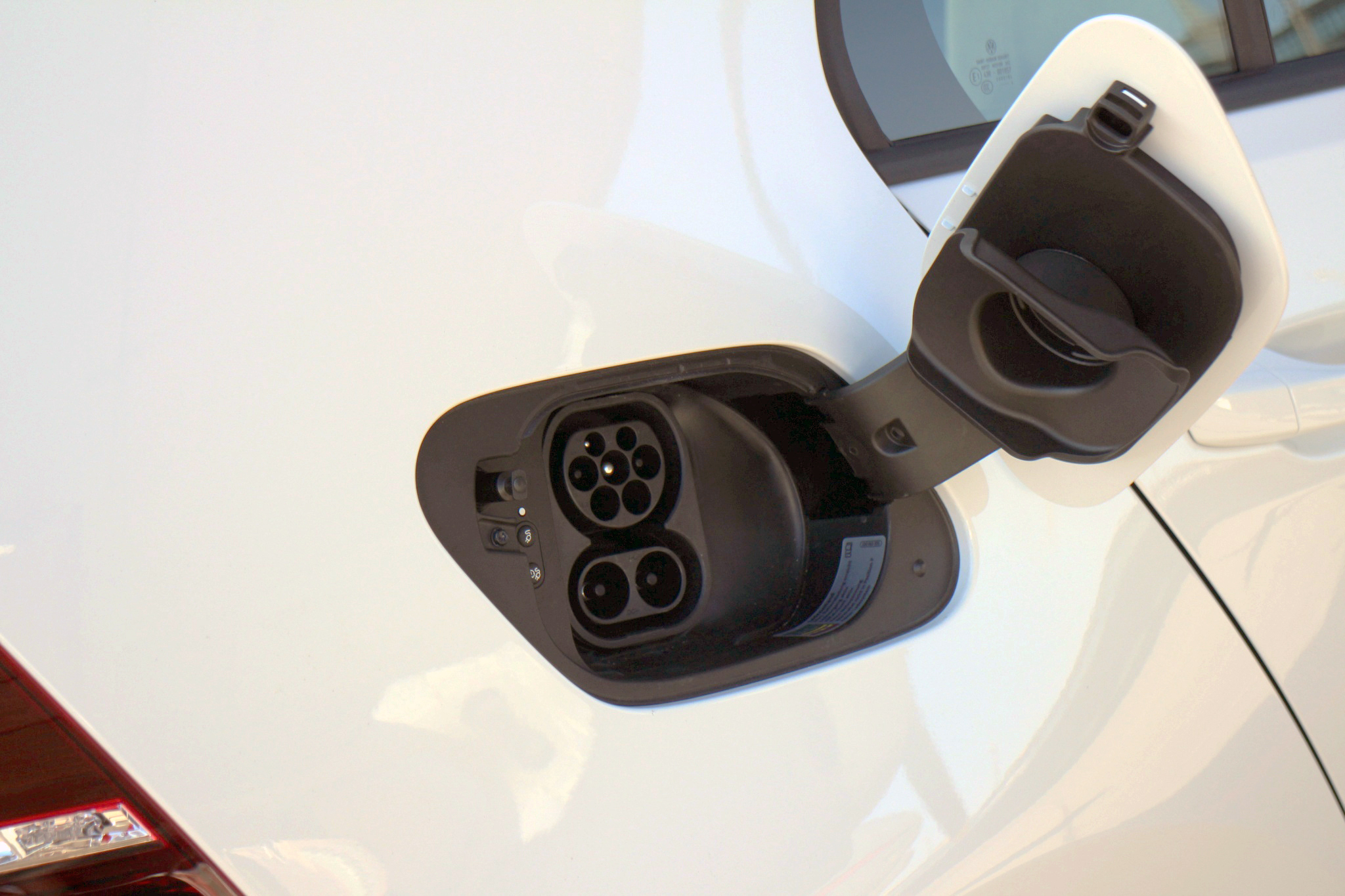 der neue, rein elektrisch angetriebene eGolf (auf Basis des Golf 7) Reichweite 130-190 km 3 Fahrmodi = Eco und Eco+, Normal 24 kWh Batterie Gewicht 318 kg 12,7 kWh/100 km Batterieposition: über Hinterachse Ladedauer: 20% auf 80% in ca. 30 Minuten beim Schnelllader und 3-4 Stunden bei Haushaltssteckdose 115 PS / 270 Nm Höchstgeschwindigkeit 140 km/h Kofferraumvolumen 341 -- 1.231 Liter Preis: ab 35.000 Euro